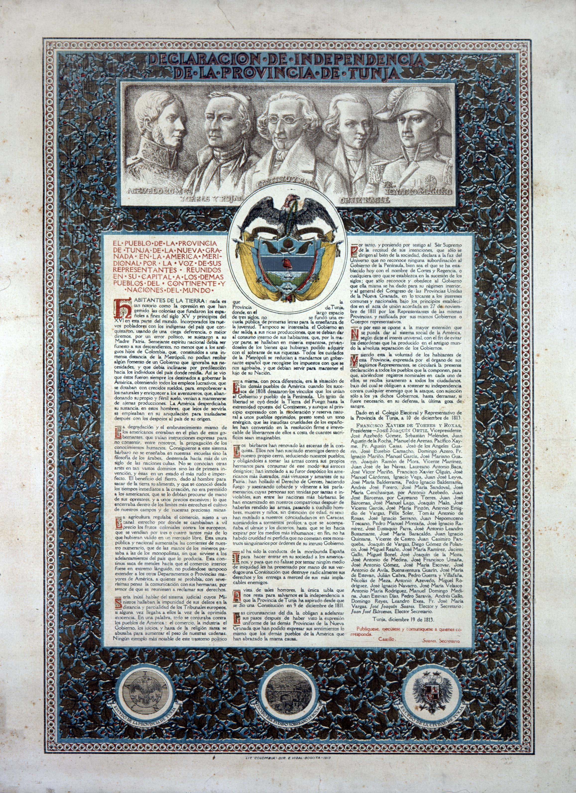 Déclaration d'independance de la Province de Tunja, 19 décembre 1813